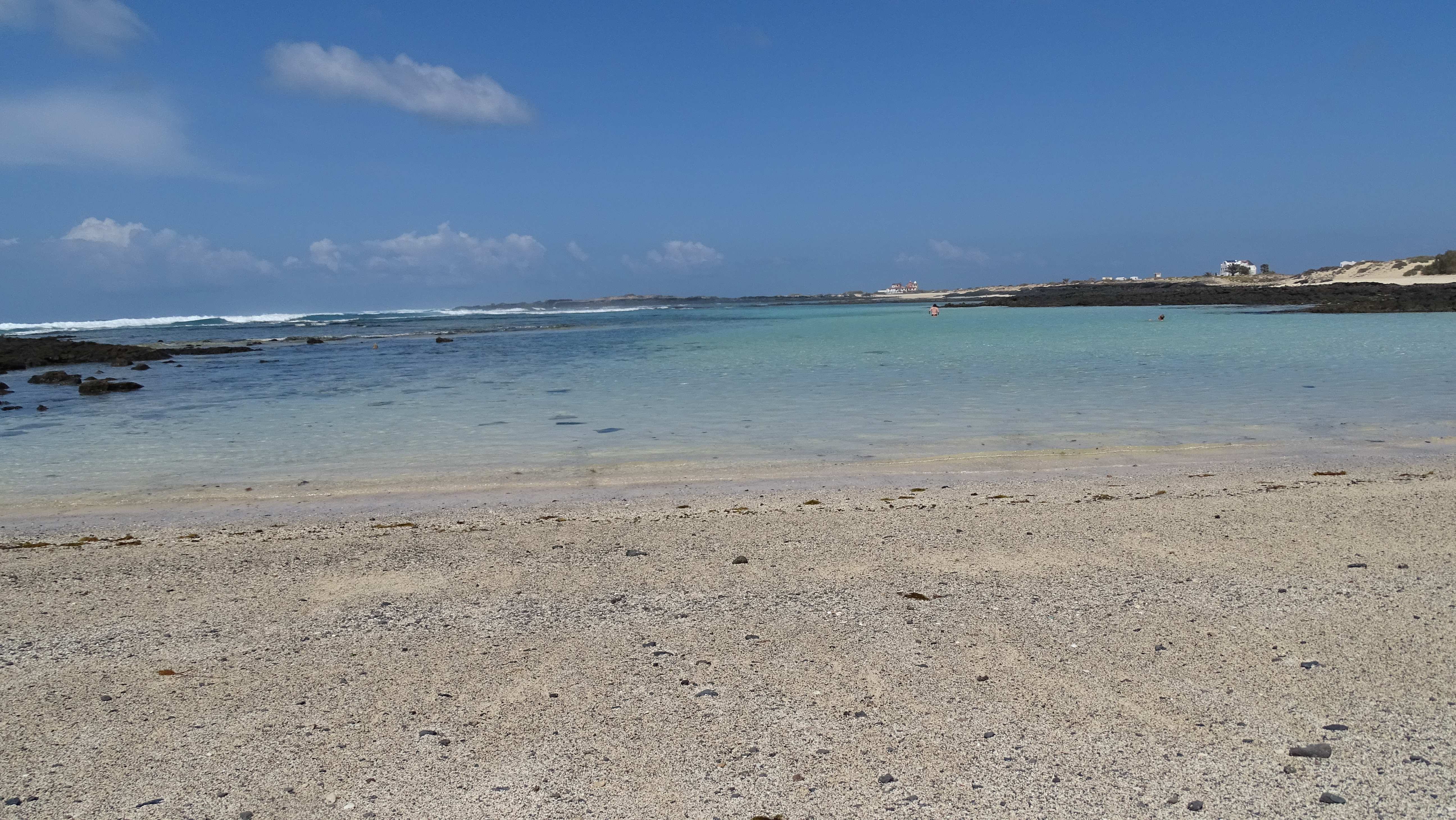 El Cotillo